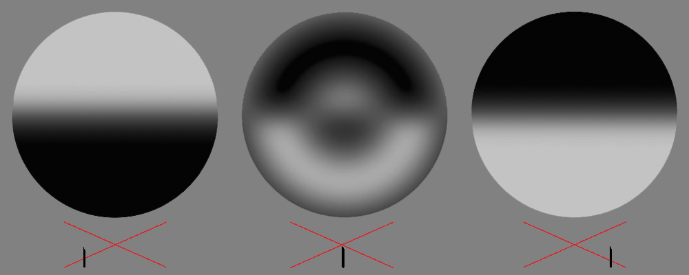 Beschreibung: Das Foucaultsche Schneidenverfahren, Bild des Prüflings je nach Lage der Schneide Quelle: gezeichnet am 11. März 2004 Zeichner: ArtMechanic Von Phrood~commonswiki nach PNG konvertiert